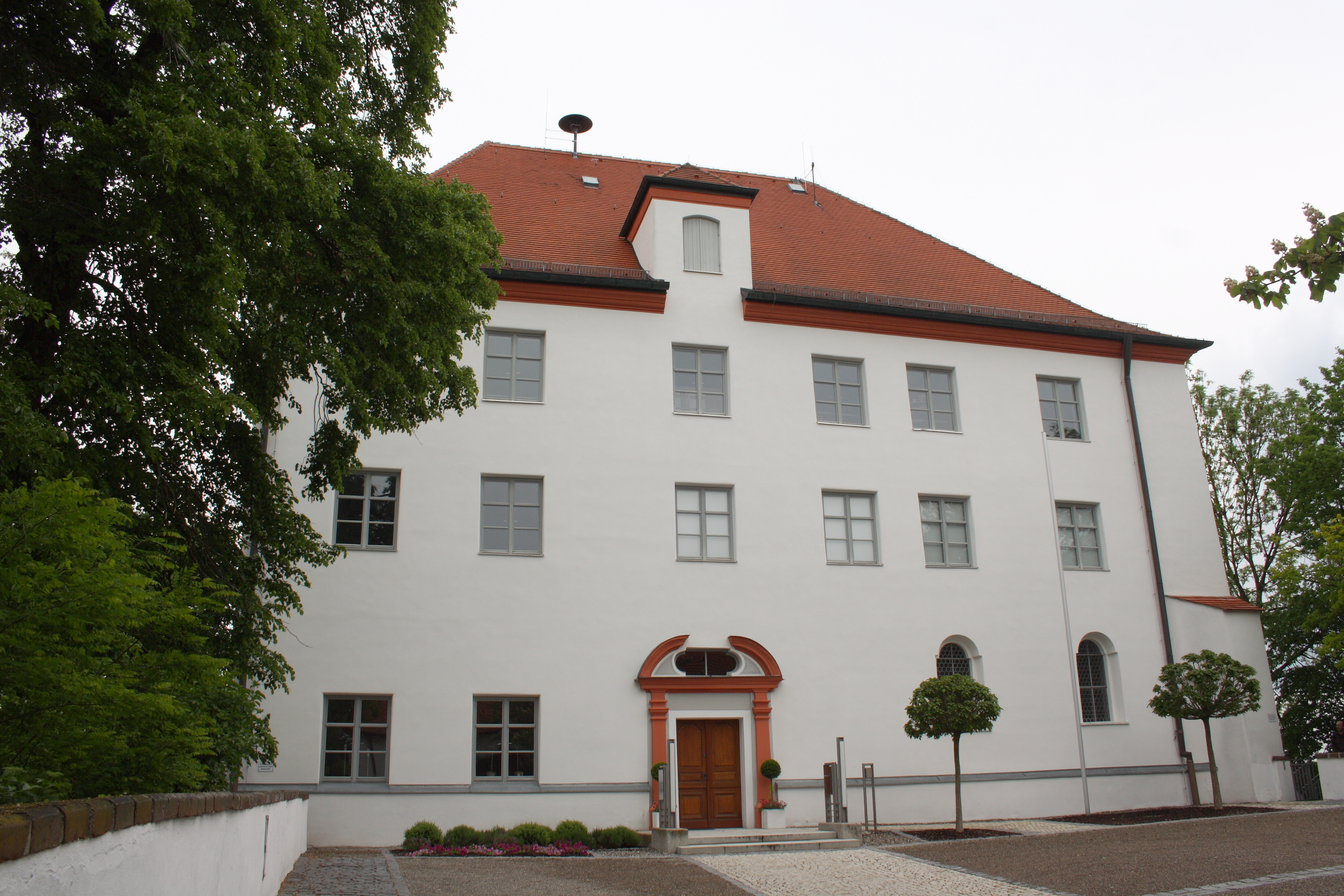 Schloss in Burgau im Landkreis Günzburg (Bayern)